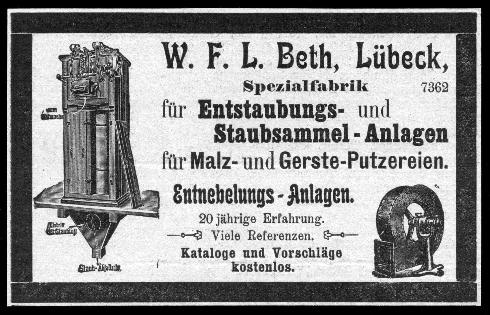 Reklame Werbung 1904 Entstaubungs- & Staubsammel-Anlagen W. F. L. Beth Lübeck